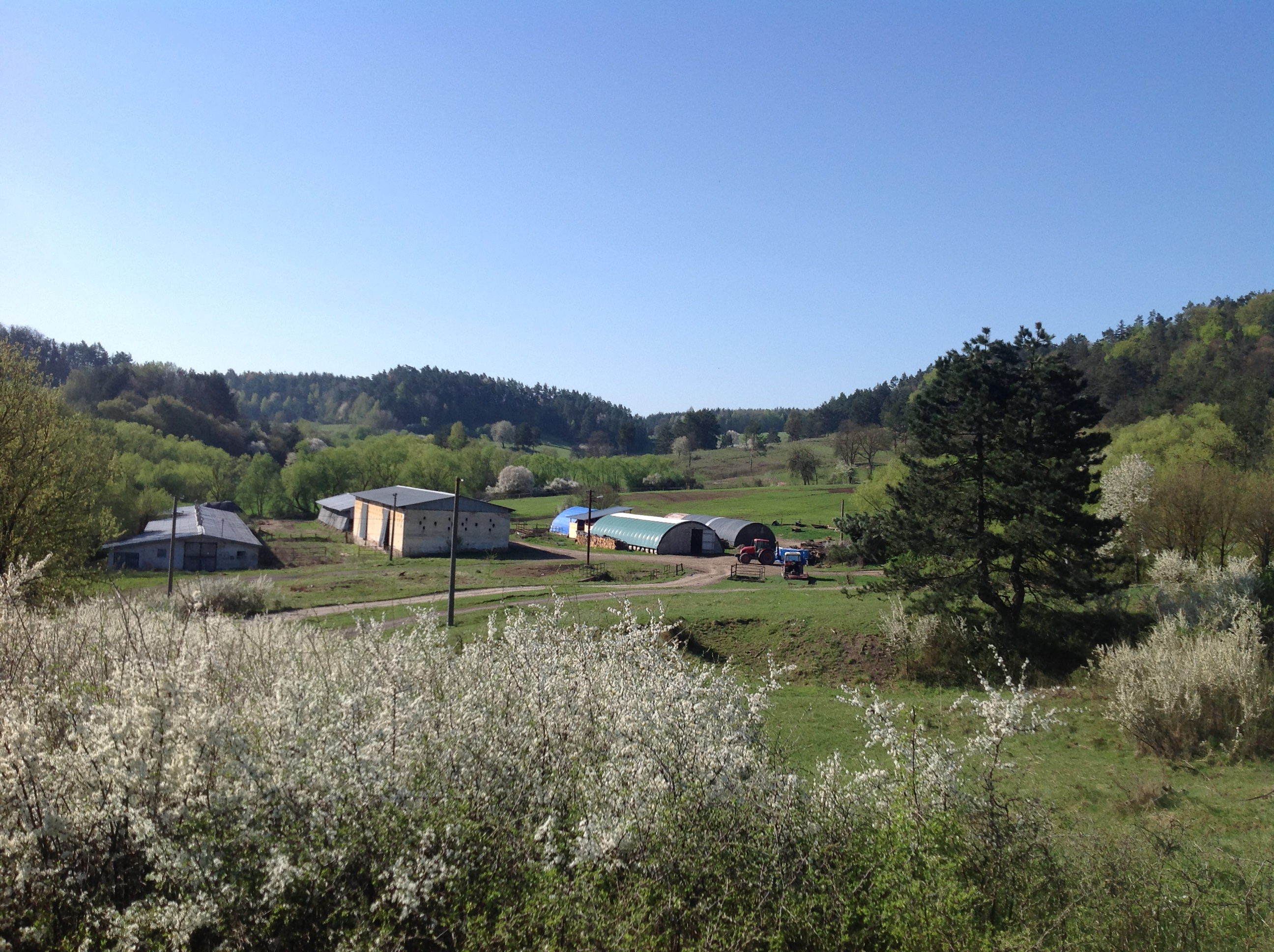 Družstvo v Sampore